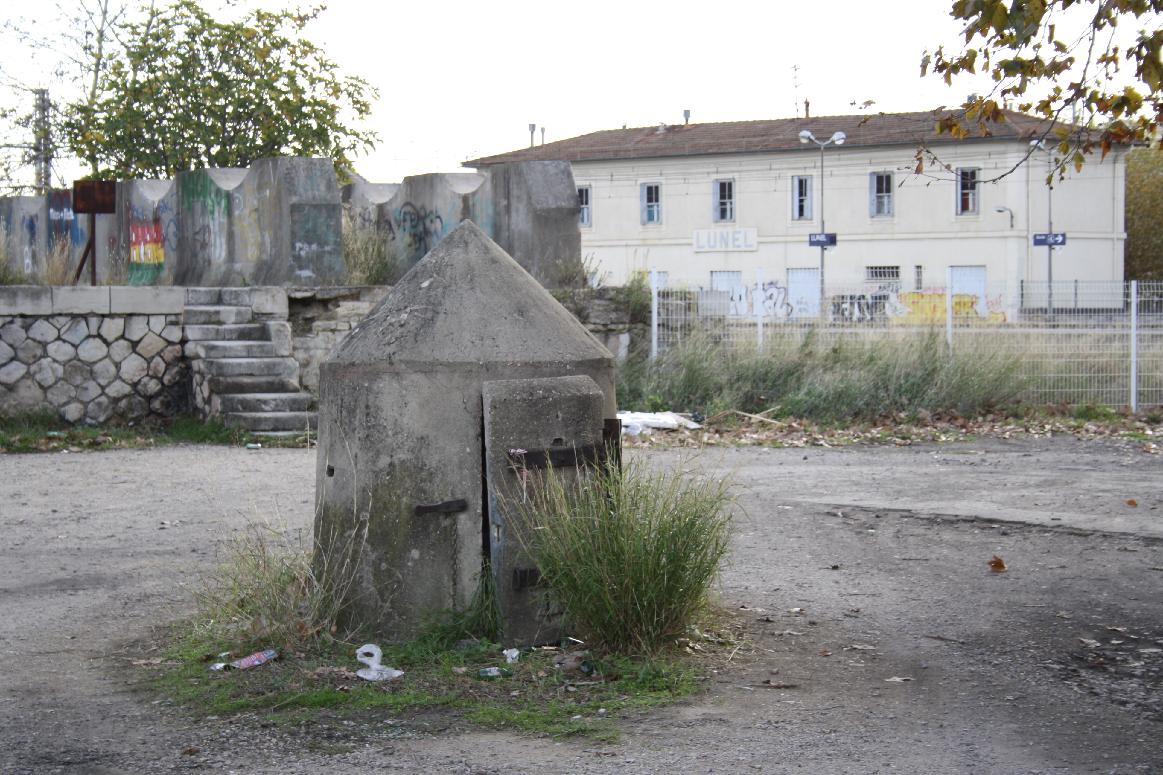 Splitterschutzzelle im Bahnhof Lunel (Südfrankreich)